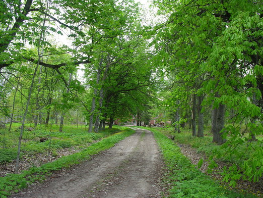 Dautarų dvaro alėja Foto: Algirdas, 2006 m. gegužės 17 d.